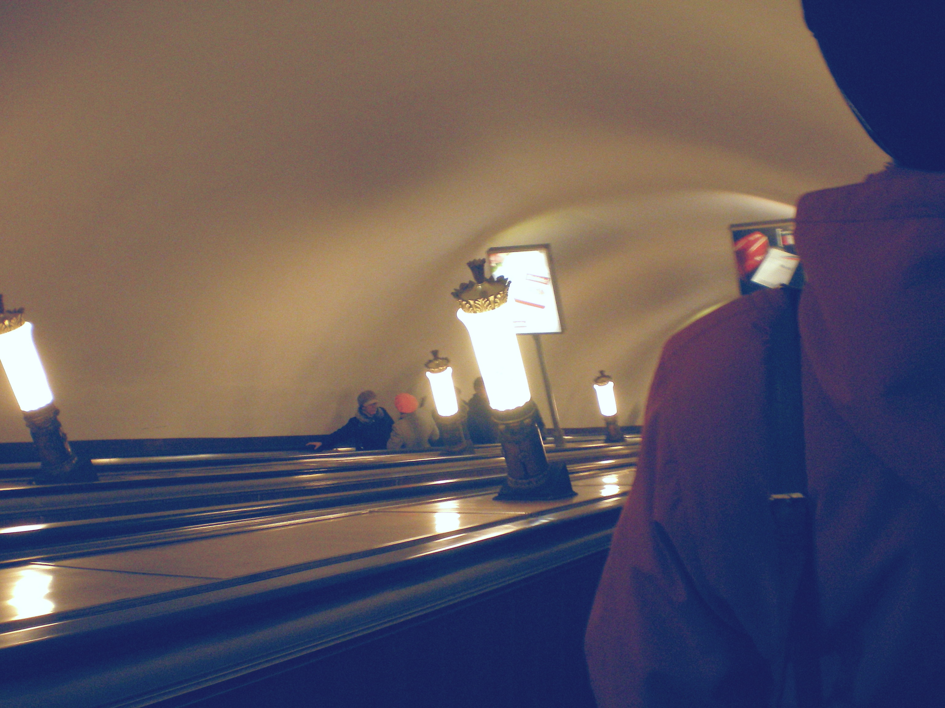 Светильники на эскалаторе станции Нарвская